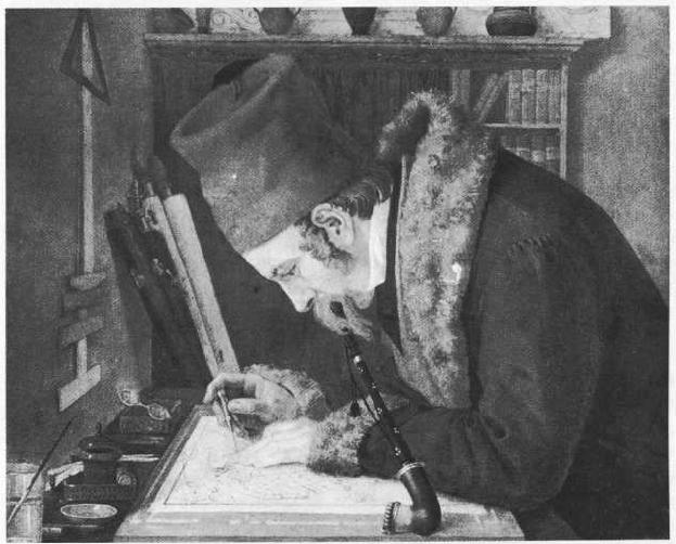 Eduard Schaubert zeichnet den Stadplan Athens